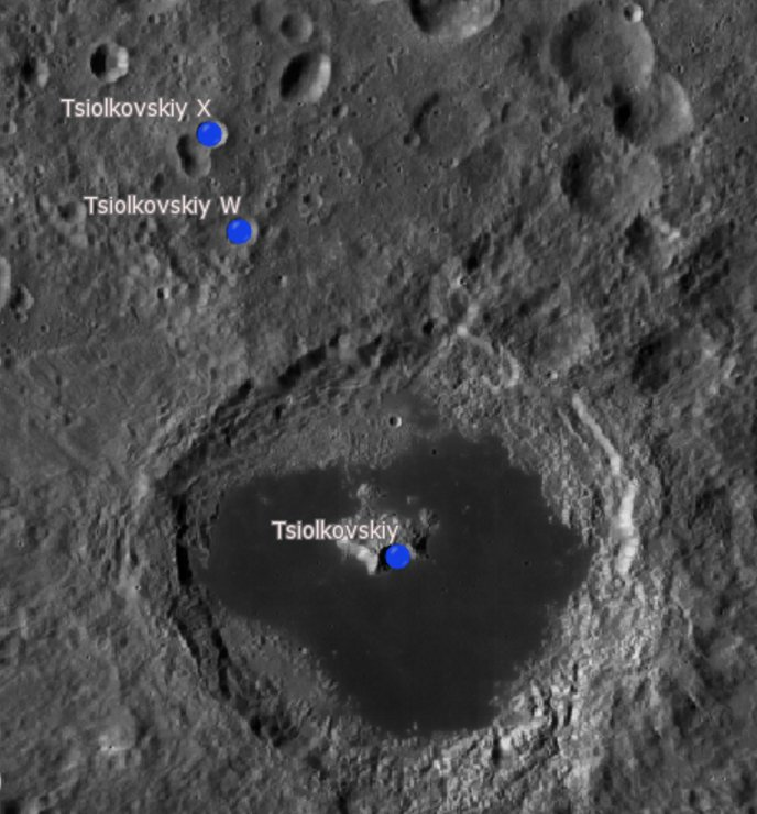 Cráter lunar Tsiolkovskiy. Cráteres satélite. (Imagen LRO)